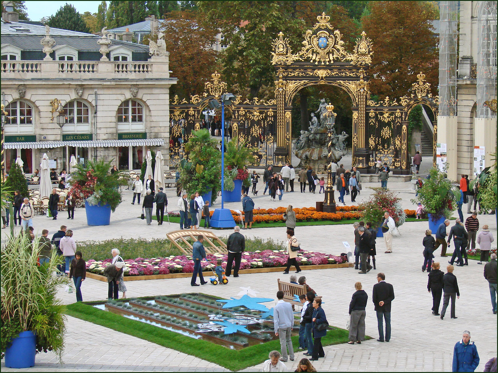 Jardins éphèmères 2009, en hommage à Louis Majorelle. Place Stanislas à Nancy Les jardiniers de la ville de Nancy célèbrent le 150ème anniversaire de la naissance de Louis Majorelle, un des grands créateurs nancéiens de l'art nouveau.